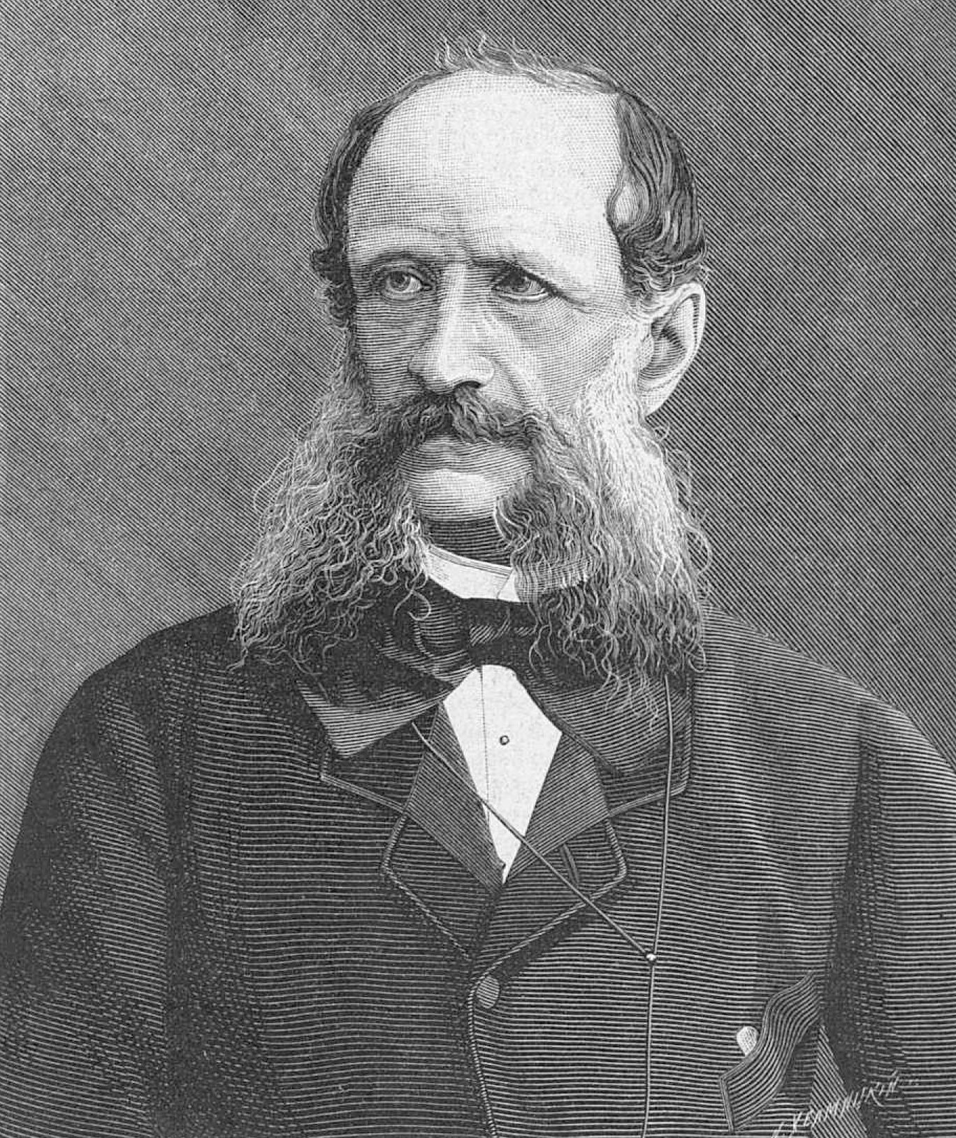 Моренгейм Артур Павлович, российский дипломат